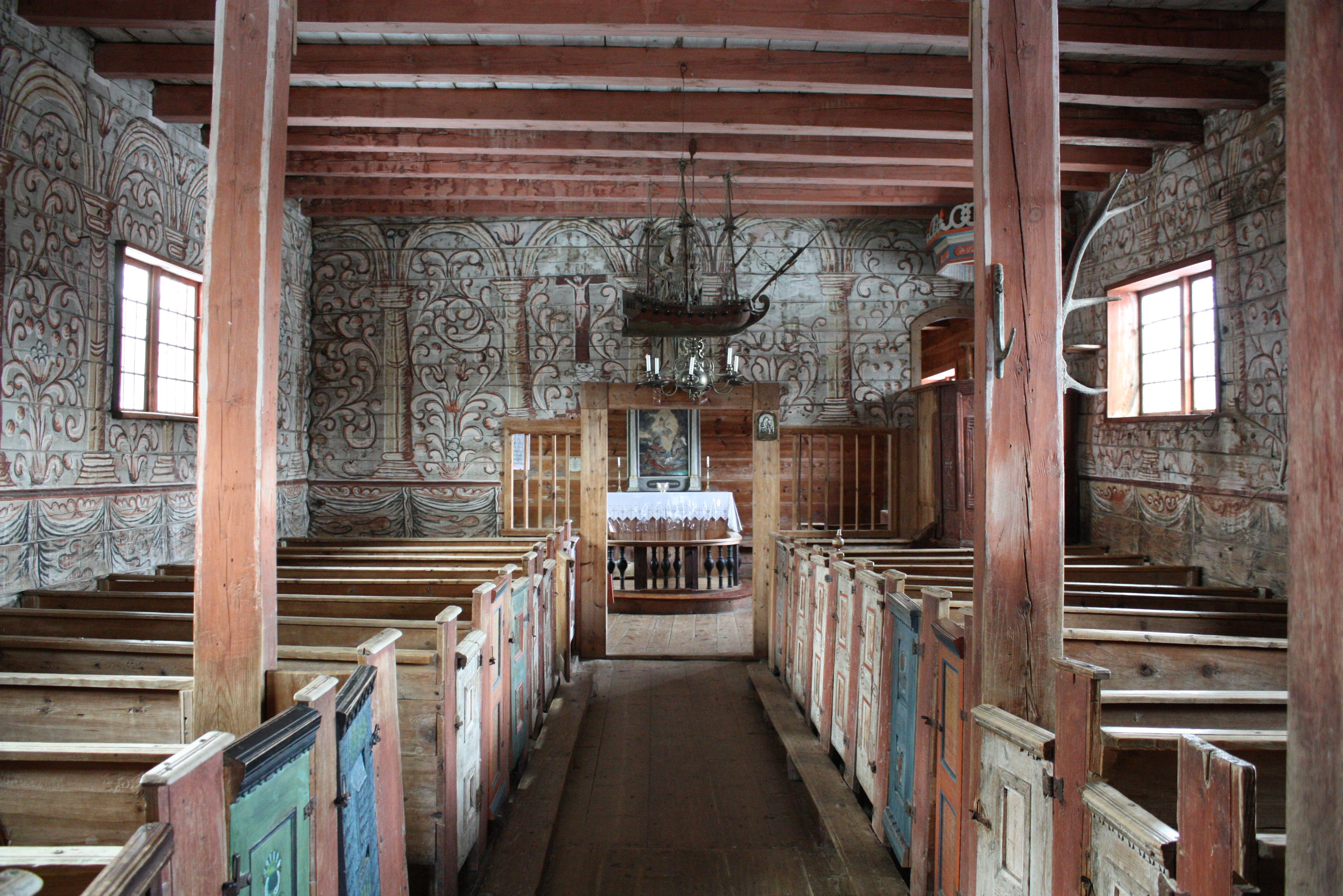 Bildet er tatt inne i Holdhus kirke. Det viser tydelig veggdekoren, samt skipet i taket.